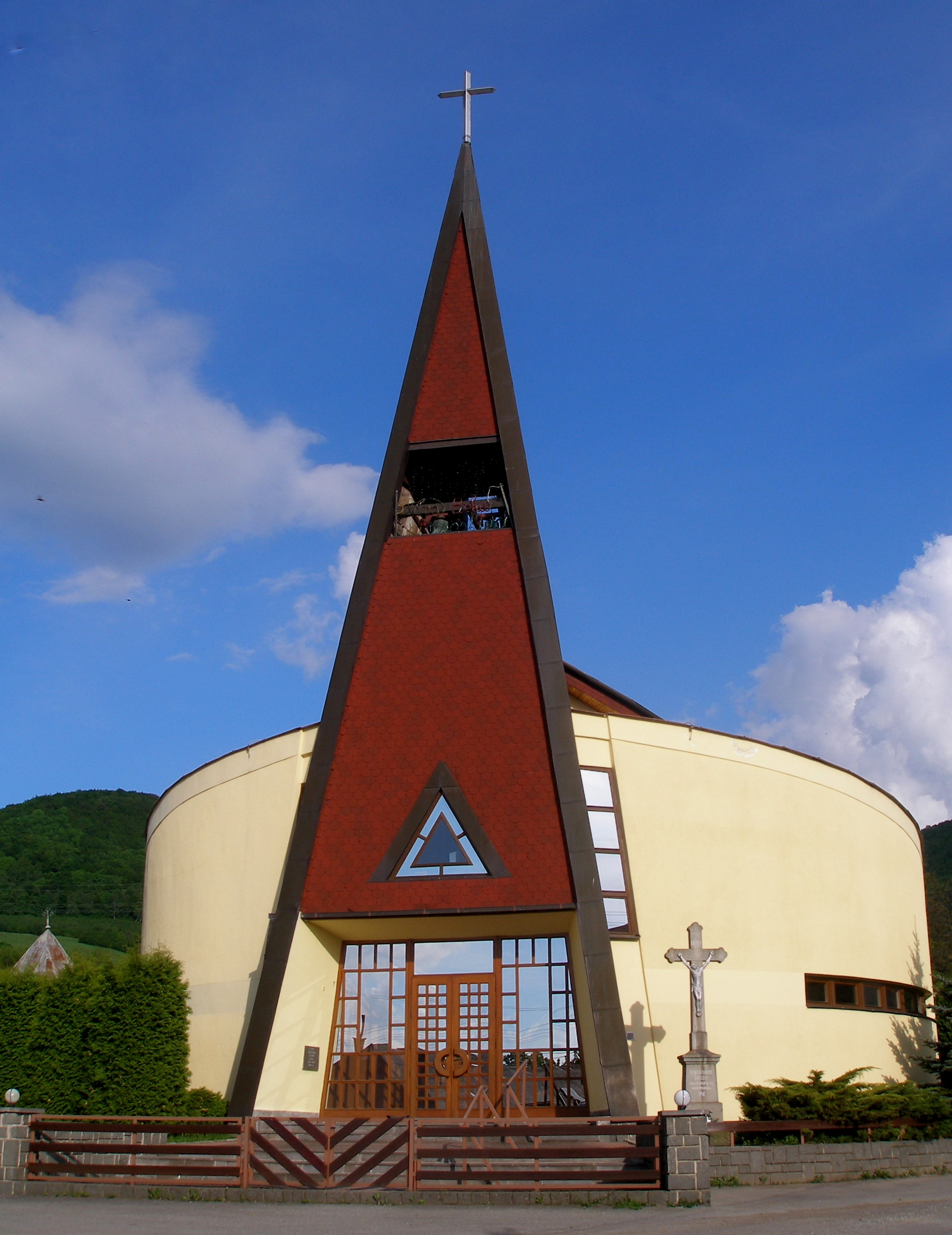 Obec Podhradík okres Prešov, miestny kostol.